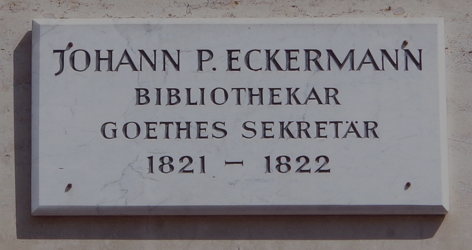 Göttinger Gedenktafel für Johann Peter Eckermann (Gotmarstraße 13)